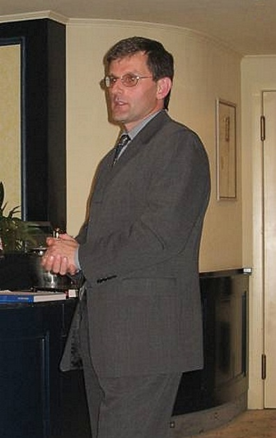 Carlo Lejeune, Belgischer Historiker und Autor